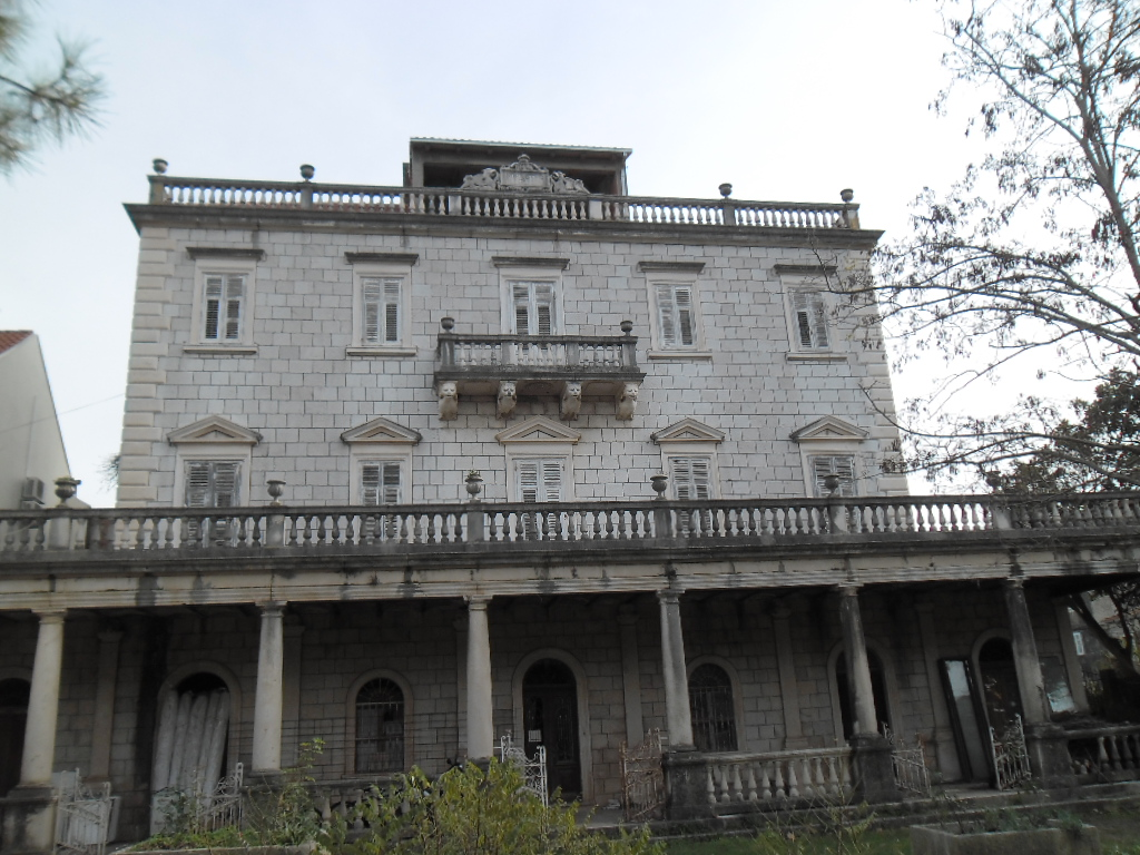 kuća u Šipanskoj Luci